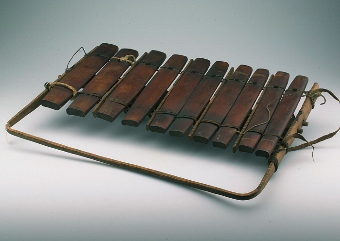 De kalebas-klankkasten zijn onder de 10 toetsen (lamellen) van de xylofoon bevestigd door middel van boombaststroken. Het geheel rust in een houten frame met draagbeugels. In de kalebassen is een gaatje gemaakt dat met een membraantje van eizakweefsel van een spin afgeplakt was; dit geeft een zoemend geluid en is daardoor een 'mirliton' (een membranofoon). De grootte van de toetsen en de kalebassen bepaalt de toonhoogte. Dit instrument -'chilanzane'- is een onderdeel van de grote timbila-ensembles, en doet dan dienst als sopraan-instrument. Meestal wordt het echter gebruikt als klein geschenk, speelgoed, of oefeninstrument. (De slagstokken ontbreken, alsmede de membraantjes op de kalebassen.)